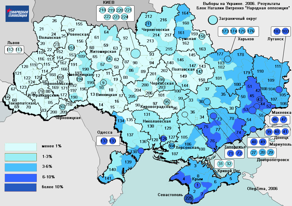 map